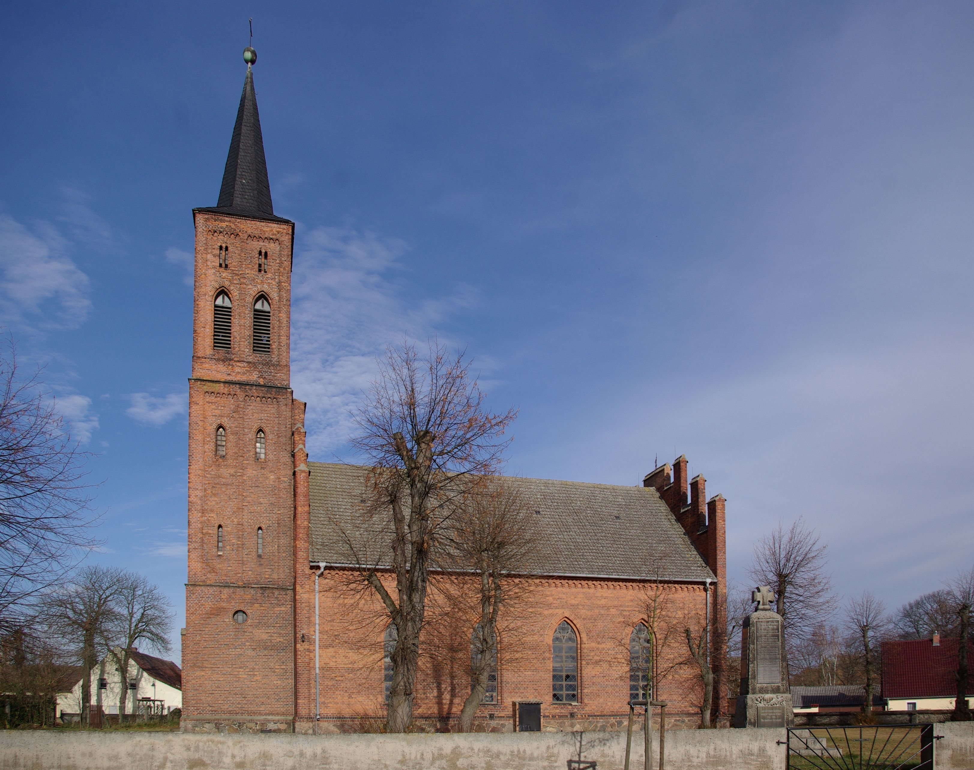 Niederer Fläming Ortsteil Meinsdorf. Die Kirche wurde 1853/1854 erbaut und steht unter Denkmalschutz.